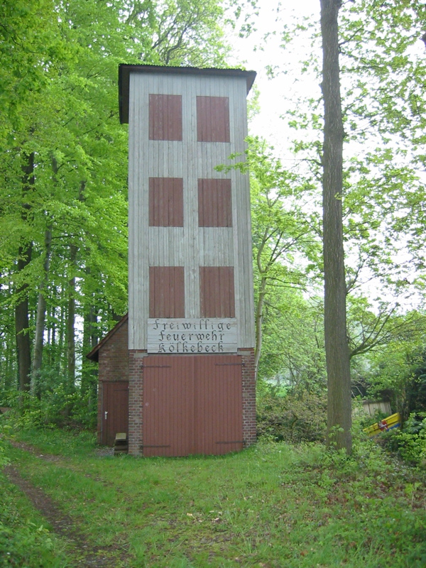 Das alte Feuerwehrgerätehaus in Kölkebeck